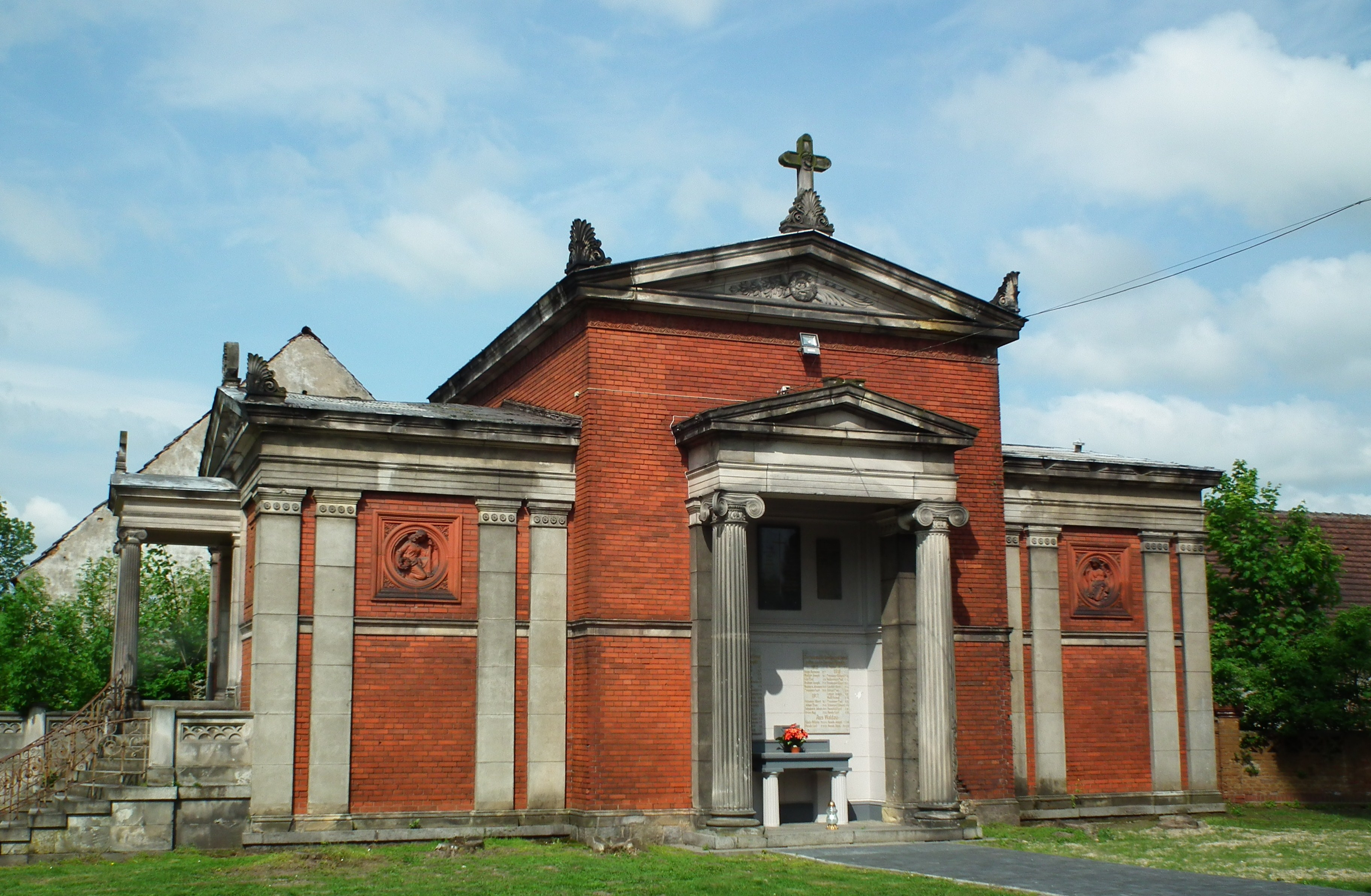 Mauzoleum Koppitzów w Kopicach.